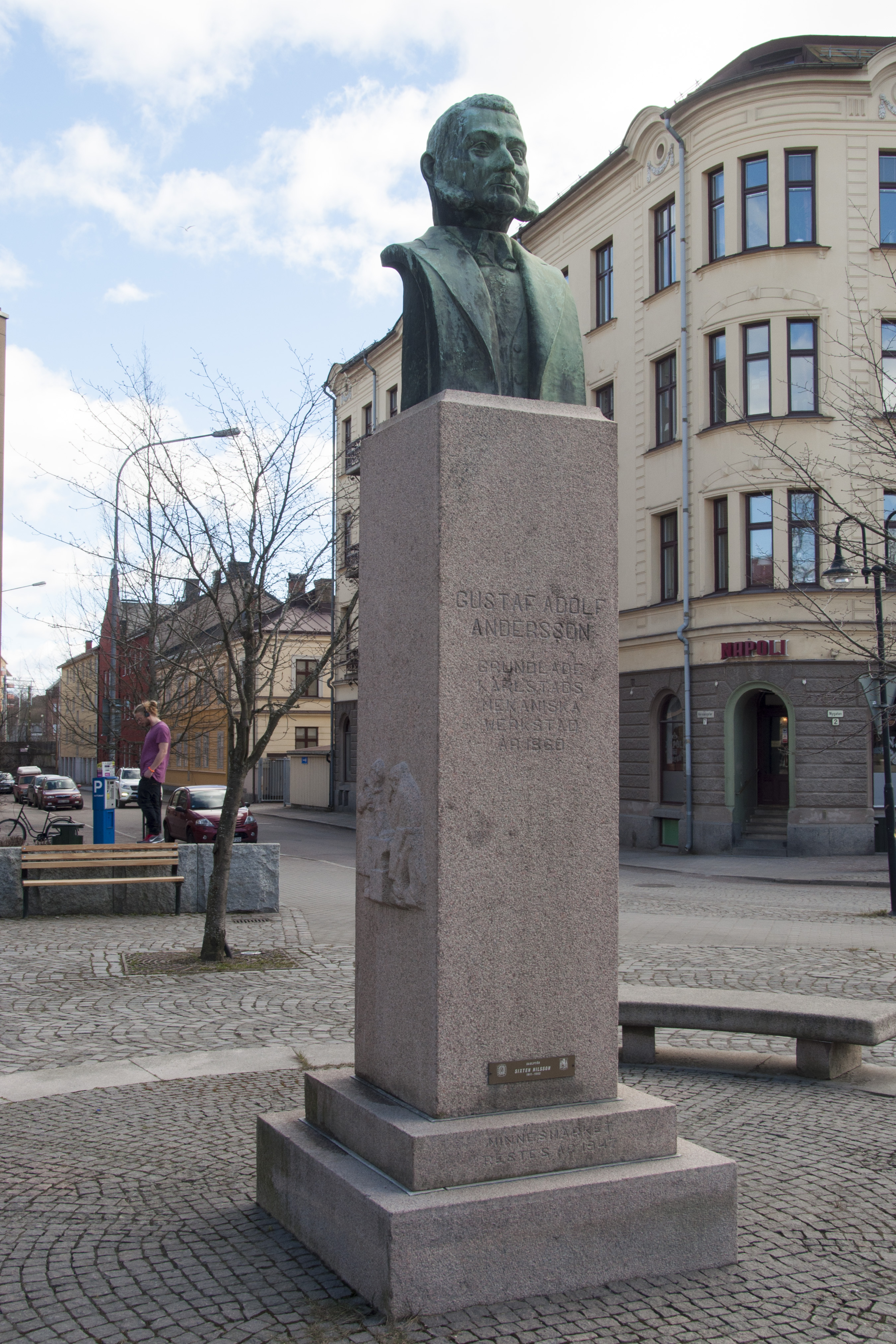 Gustaf Adolf Andersson, grundare av Karlstads mekaniska verkstad. Minnesmärket restes 1947, Skulptör Sixten Nilsson.